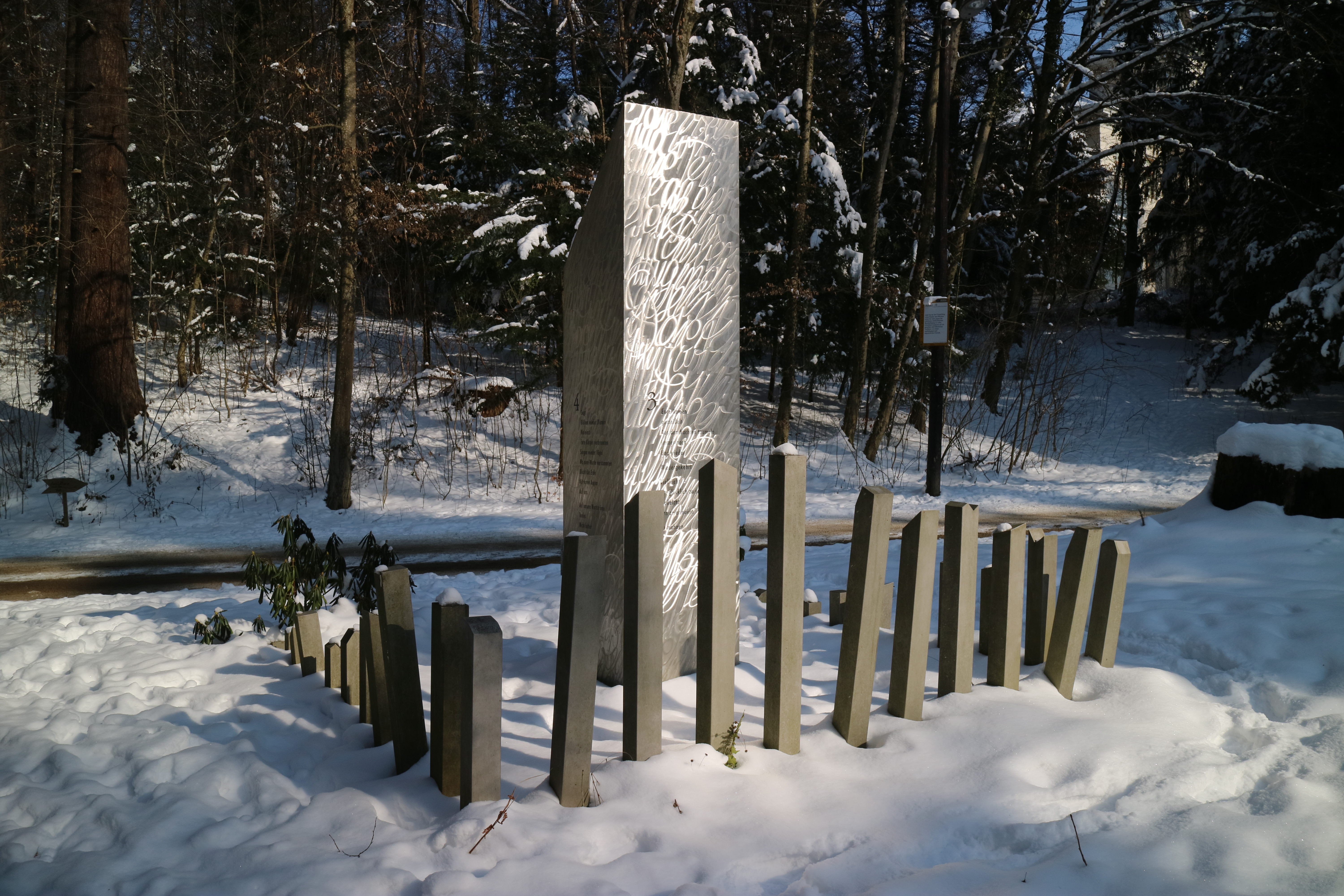 Denkmal im Leechwald zur Erinnerung an die Verfolgung und Vernichtung von Menschen mit Behinderung während der NS-Diktatur, Graz-Mariatrost